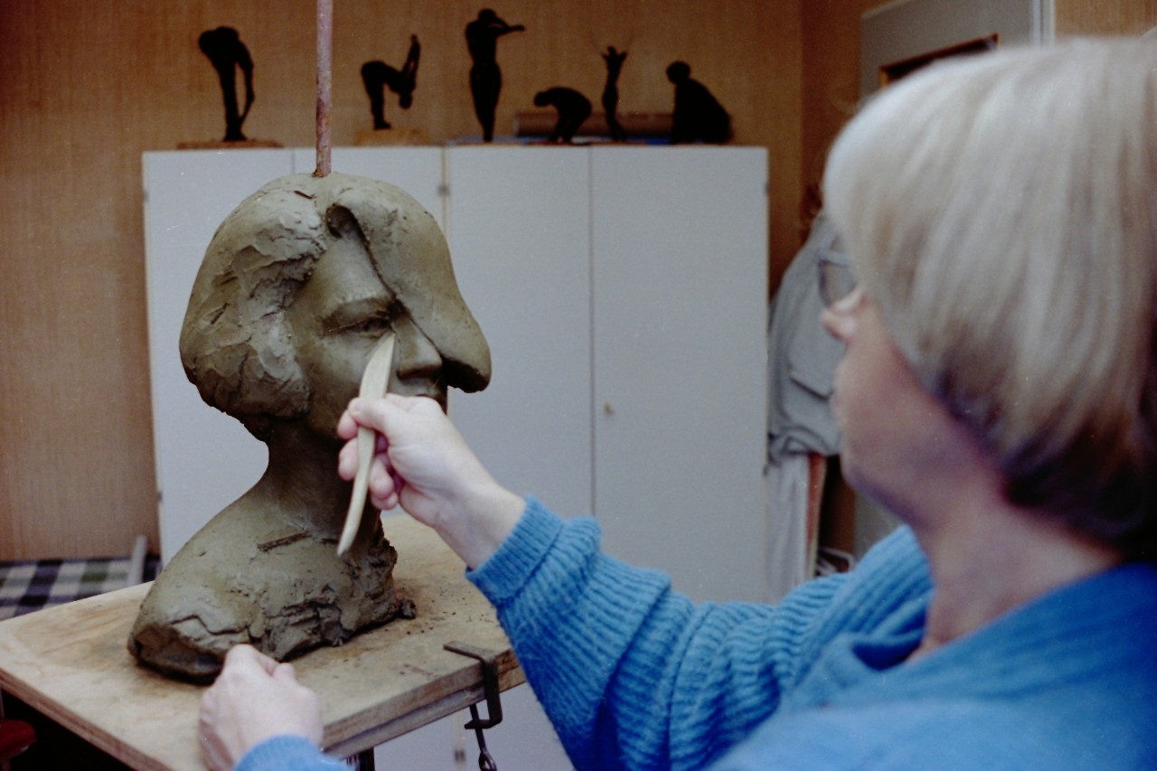 Truus Wilders-IJlst maakt portret naar model